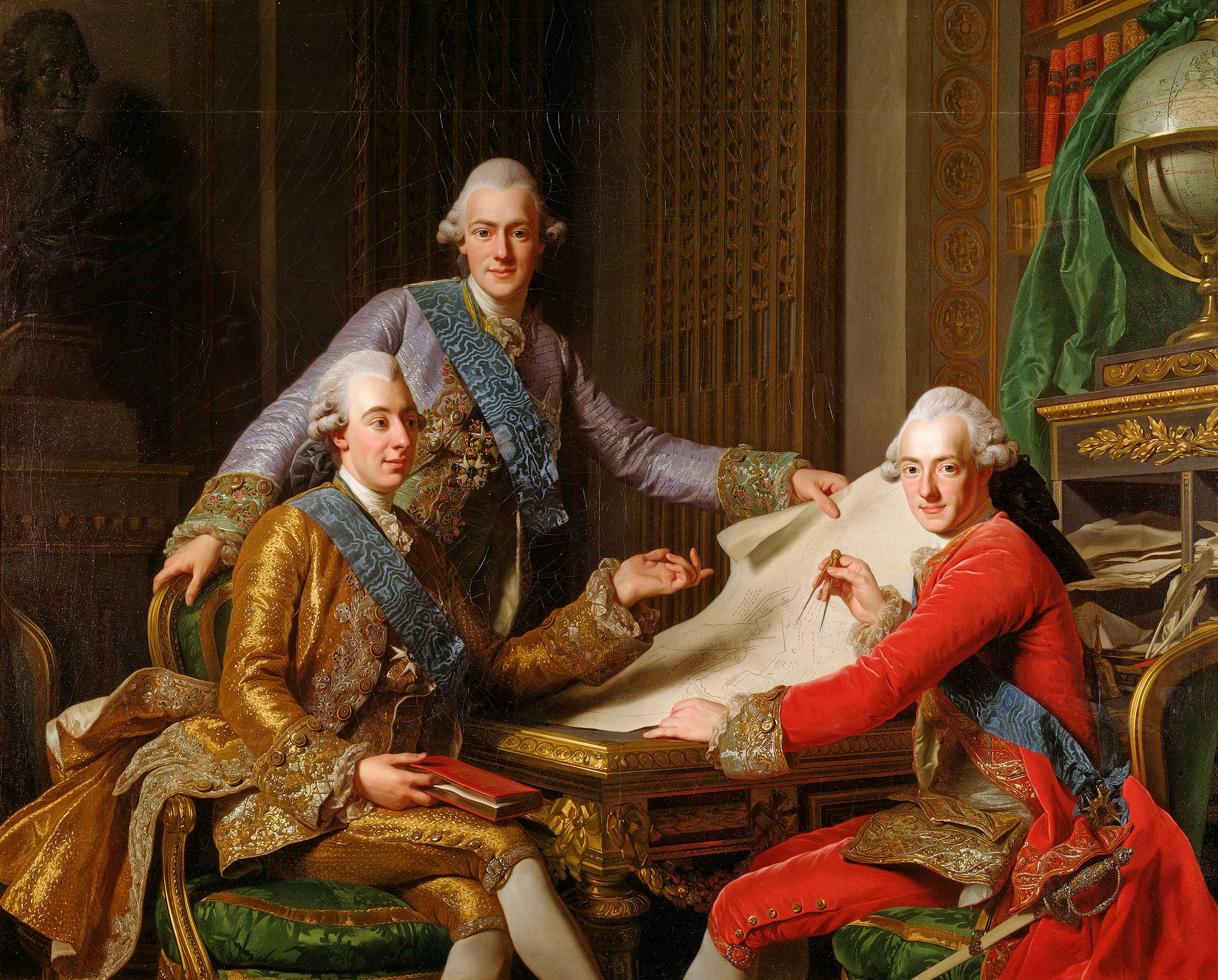 Gustav III of Sweden, and his brotherslabel QS:Lsv,"Tre bröder. Gustav III i guldrock till vänster, prins Fredrik Adolf i mitten och prins Karl, sedermera kung Karl XIII, till höger i röd rock." label QS:Len,"Gustav III of Sweden, and his brothers"